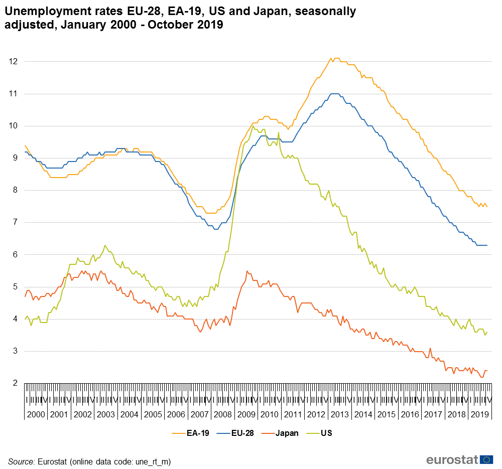 ヨーロッパ連合とアメリカ合州国と日本の2000年1月～2019年10月までの失業率